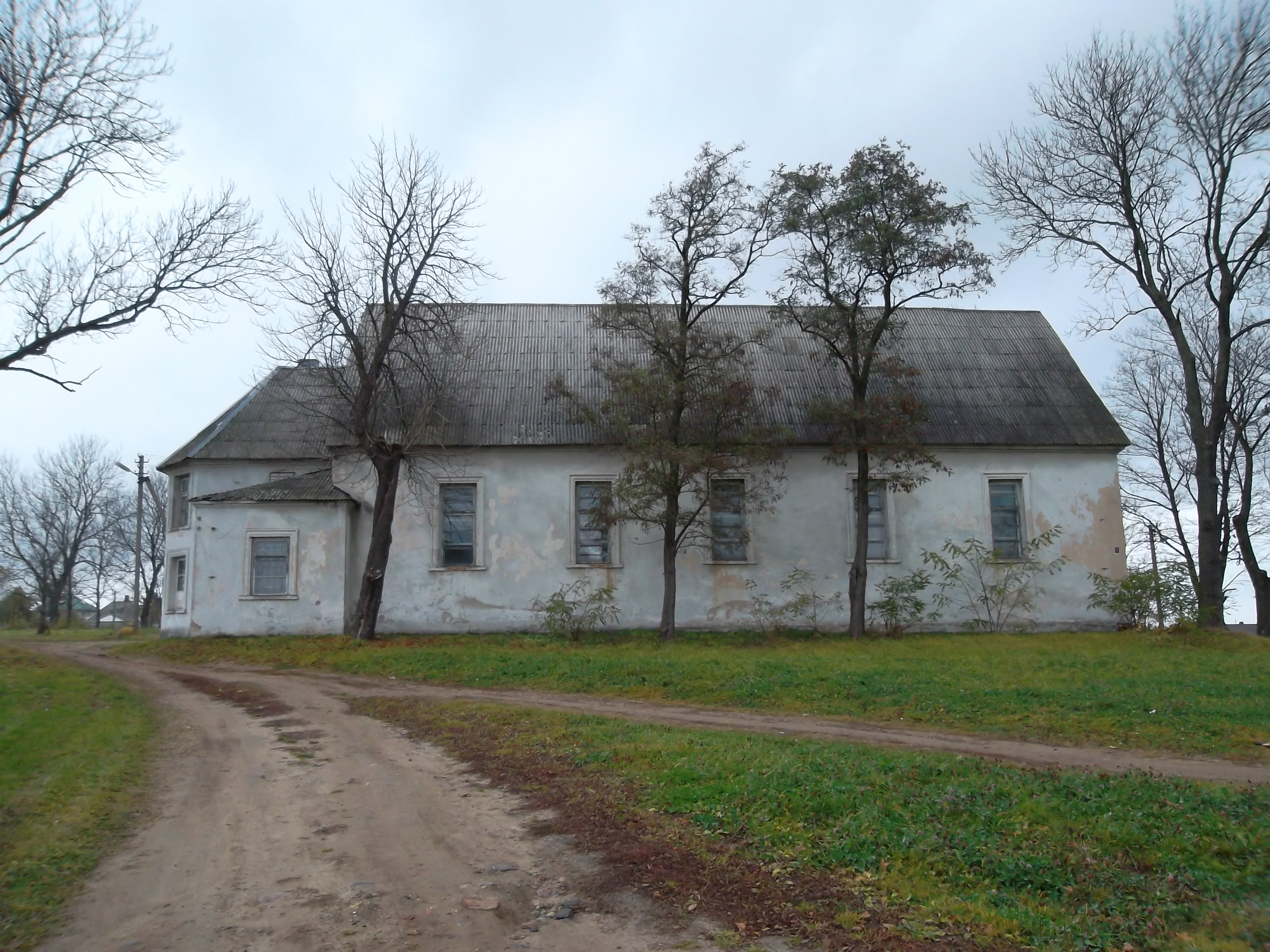 Kalvarijos evangelikų liuteronų bažnyčia